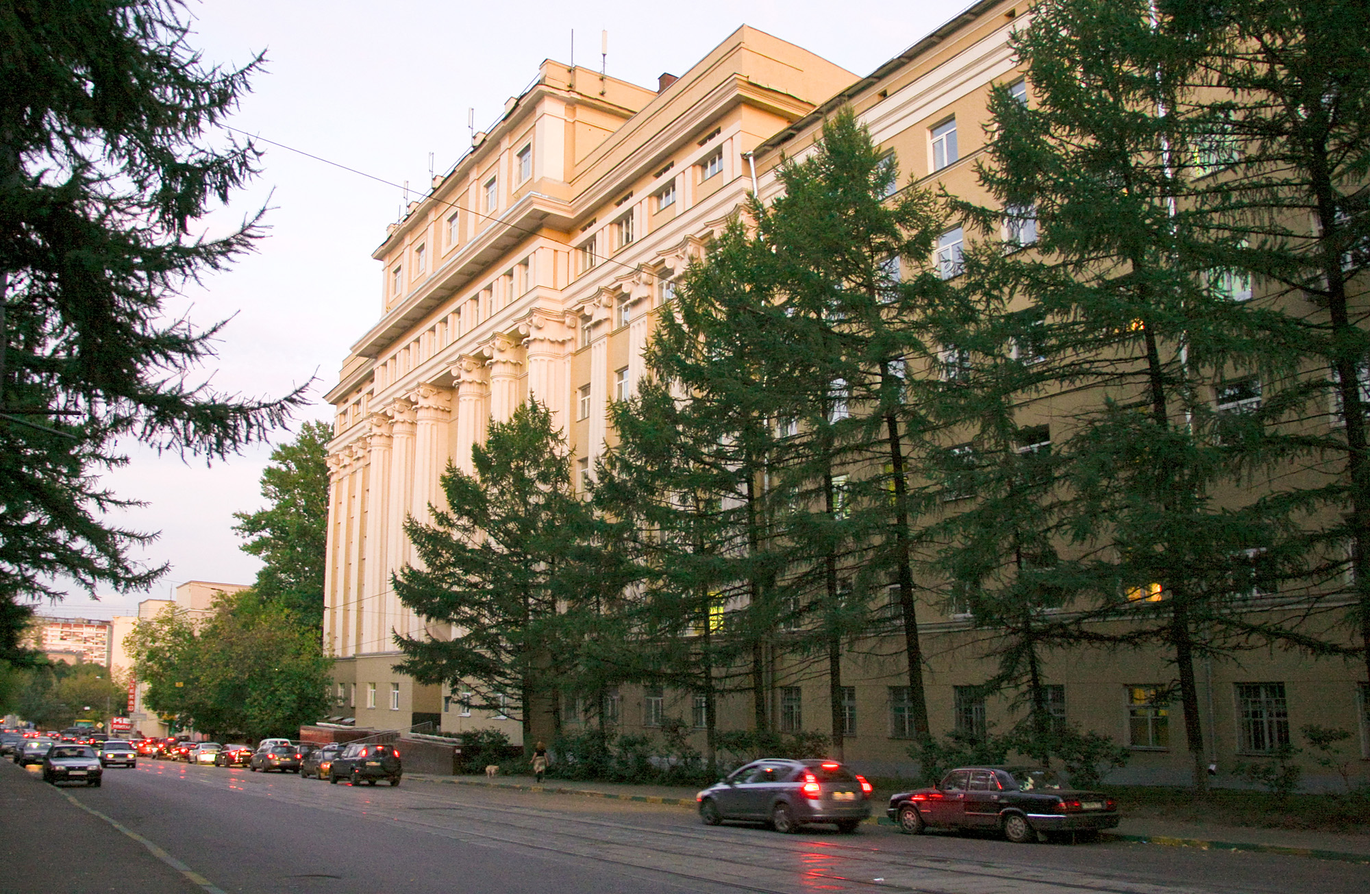 Здание РУДН на ул.Орджоникидзе